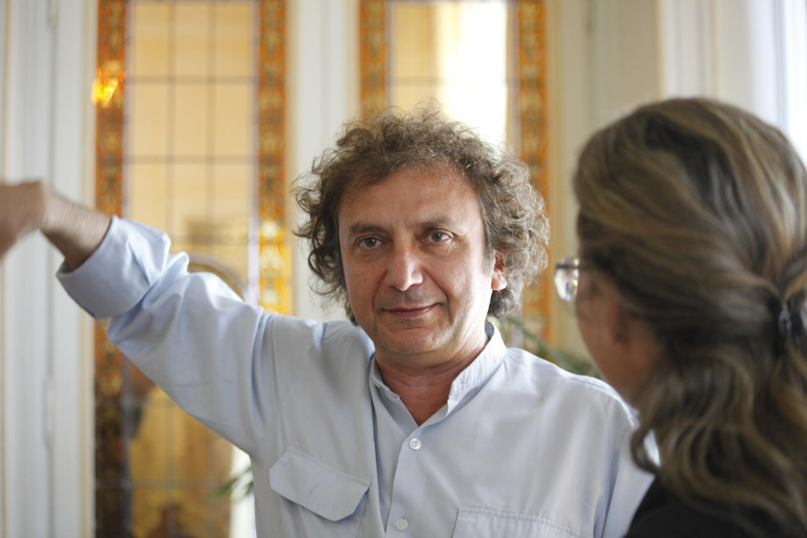 Roberto Cacciapaglia